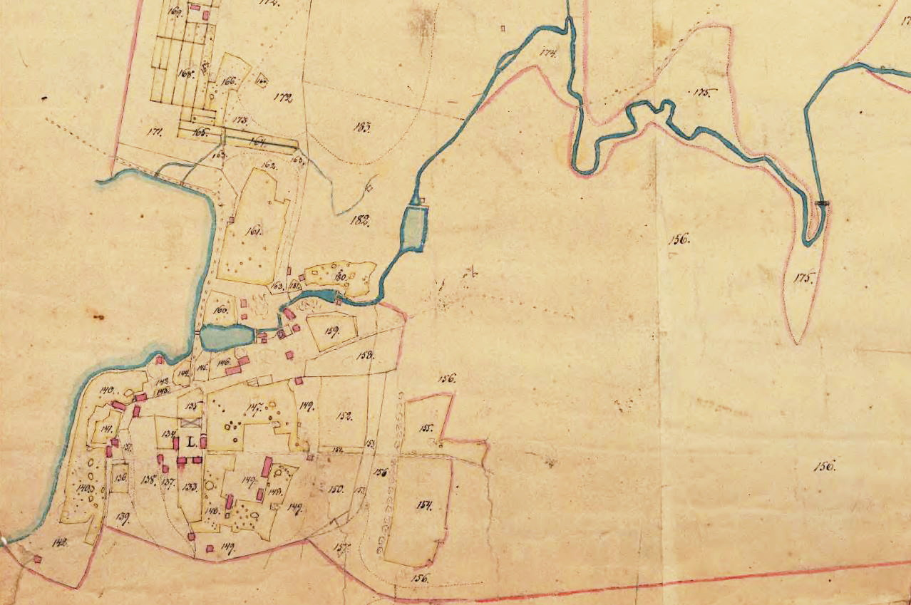 Karta över Ulriksberg, södra del